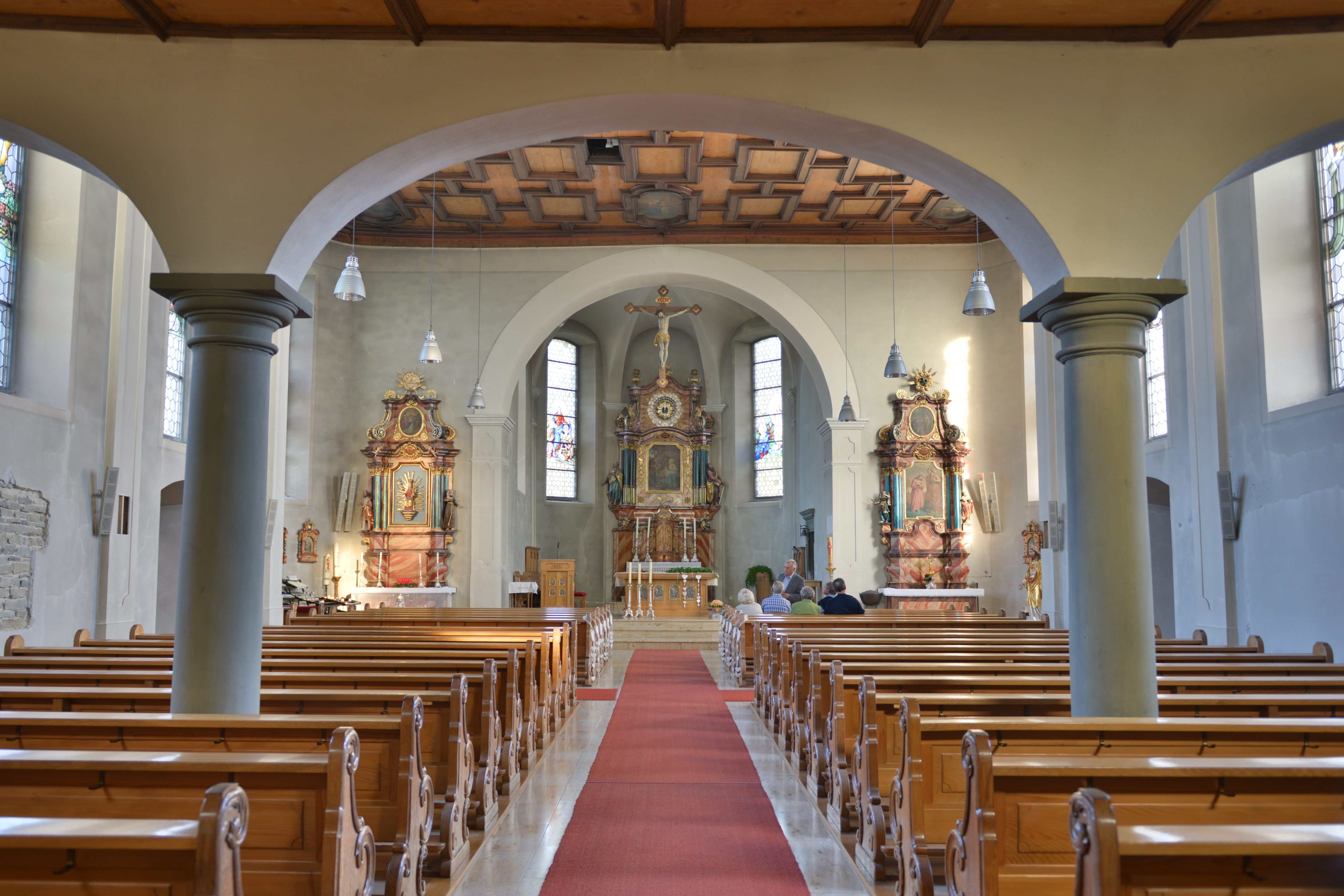 Bildstein , Wallfahrtskirche Mariä Heimsuchung